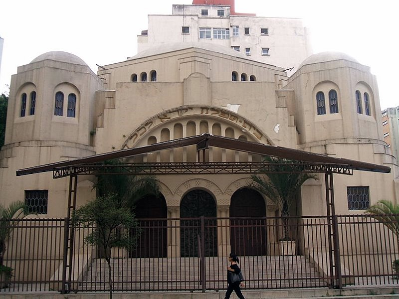 Sinagoga Beth El, em São Paulo, Brasil.